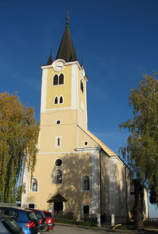 Crkva Sv. Ivana Krstitelja u Zelini, Zagrebačka županija